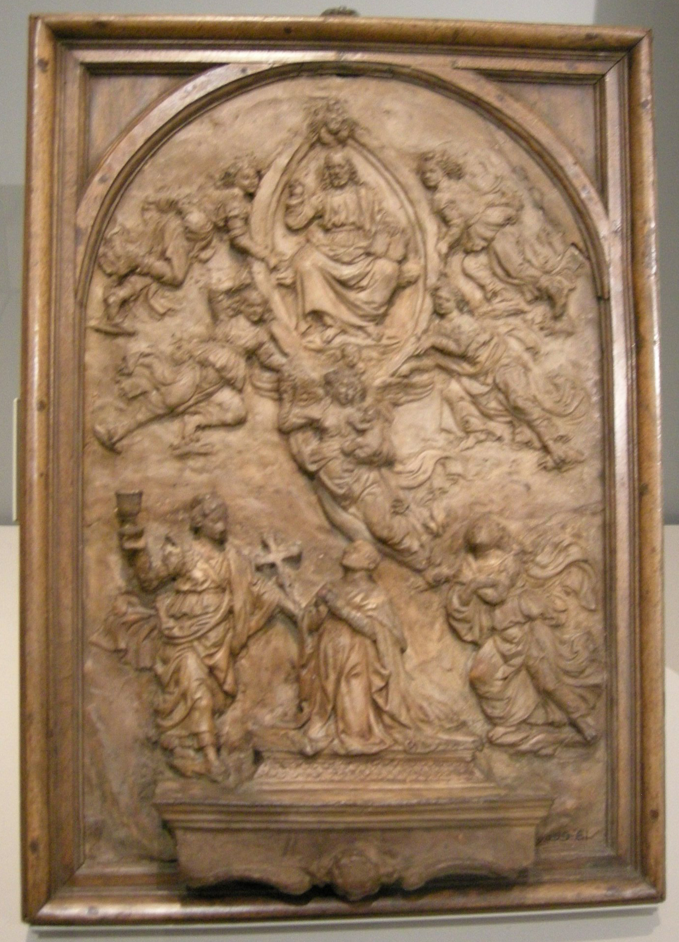 Verrocchio, modello per il monumento del cardinale forteguerri, 1476 circa